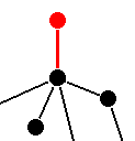 Ein erläuterndes Bild zum einem Beweis von Eulers Polyedersatz